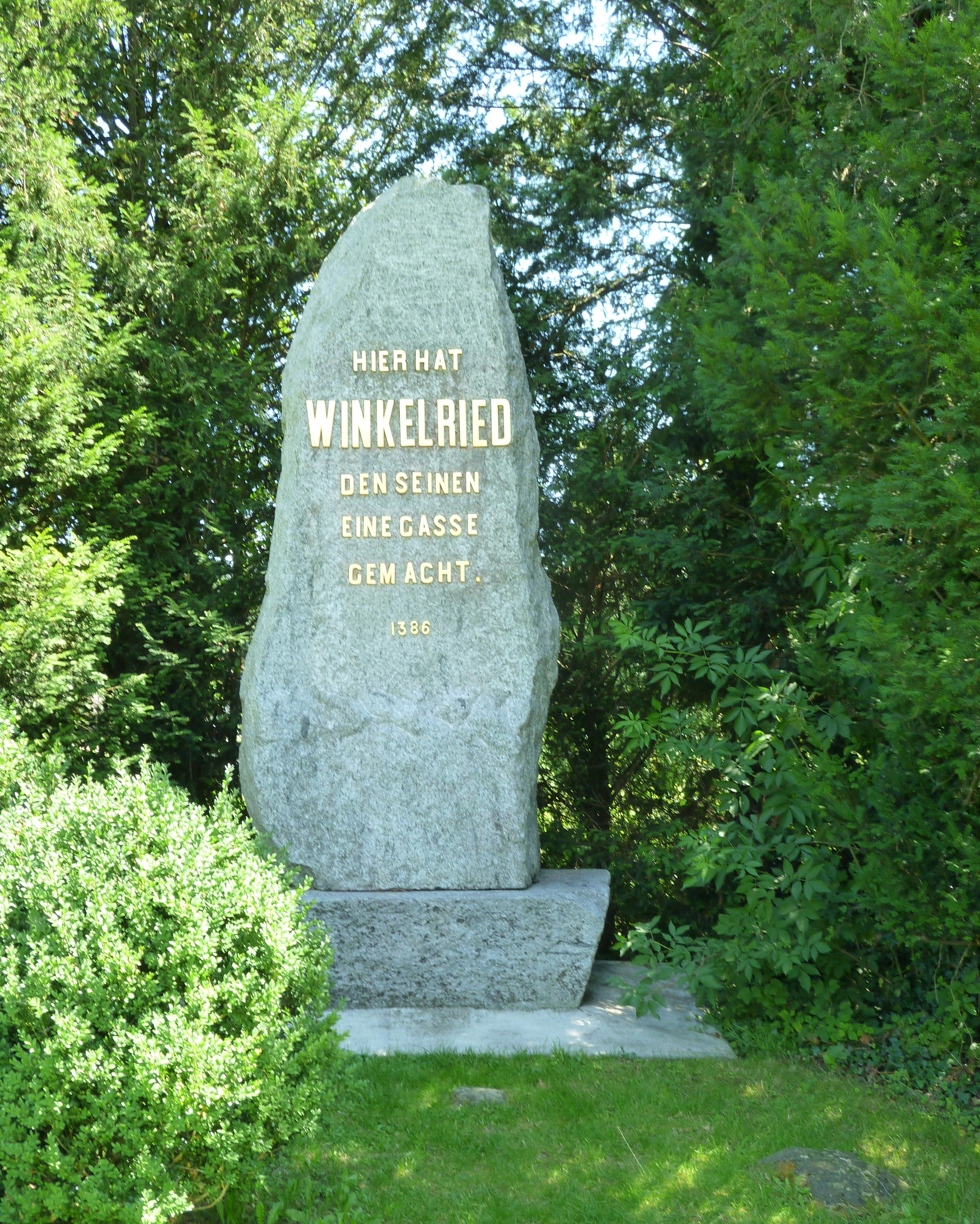 Schlacht von Sempach: Denkmal Winkelried